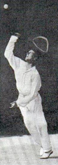 Hugh Lawrence Doherty, lors de la finale du simple homme des Jeux Olympiques de 1900